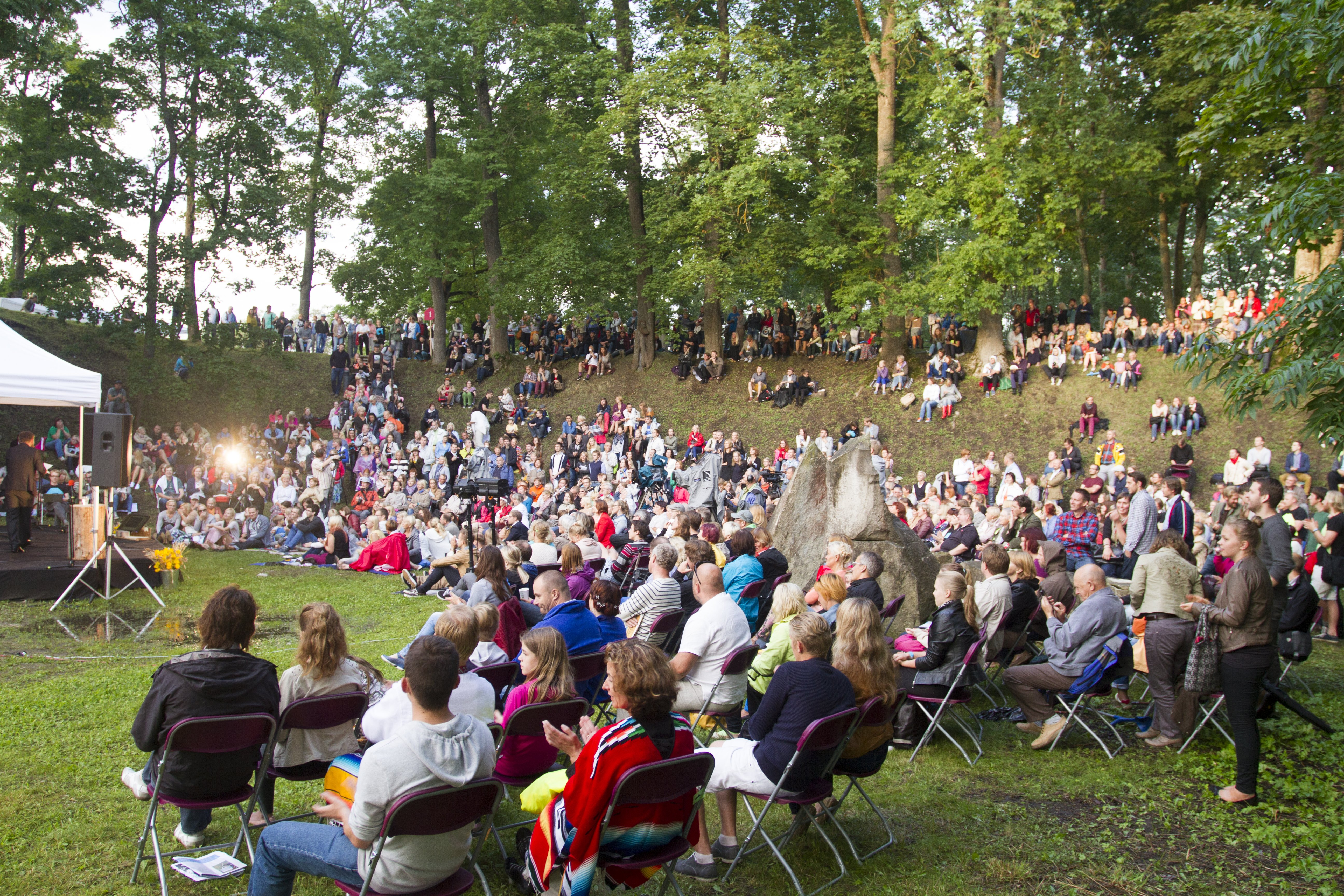 Arvamusfestival 2014